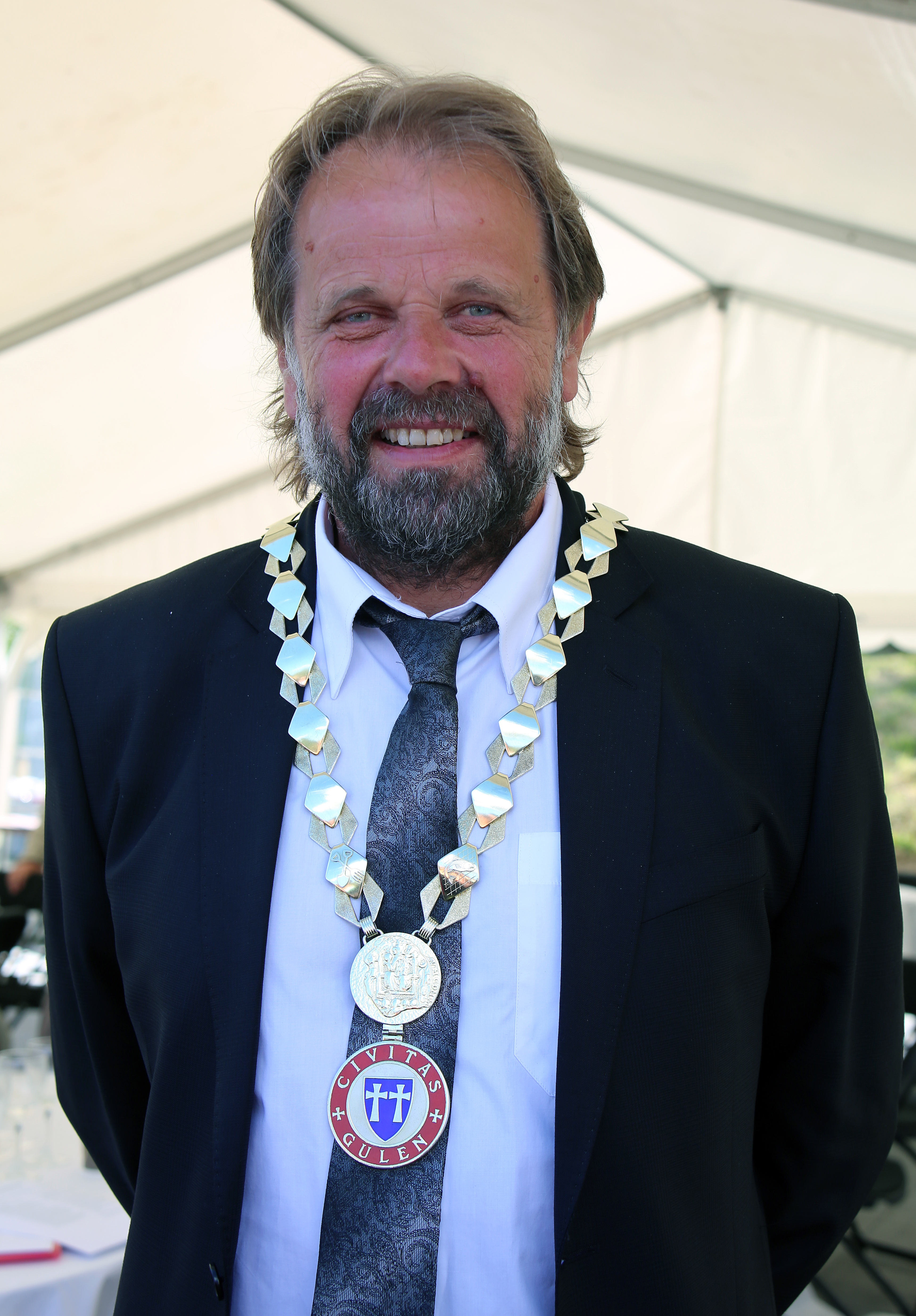 Ordføreren i Gulen